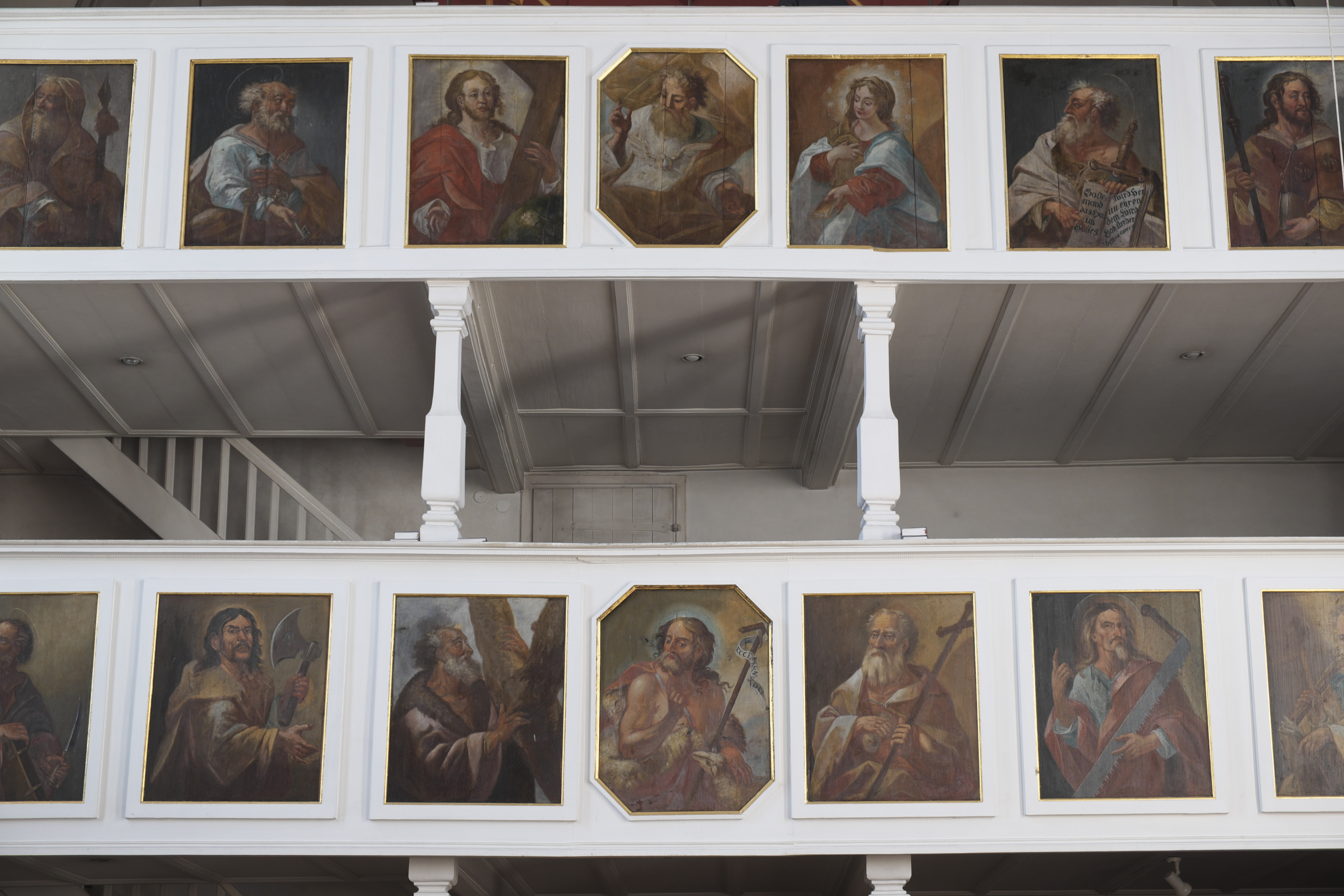 Katholische Pfarrkirche St. Johannes der Täufer in Zolling im Landkreis Freising (Bayern/Deutschland), Empore